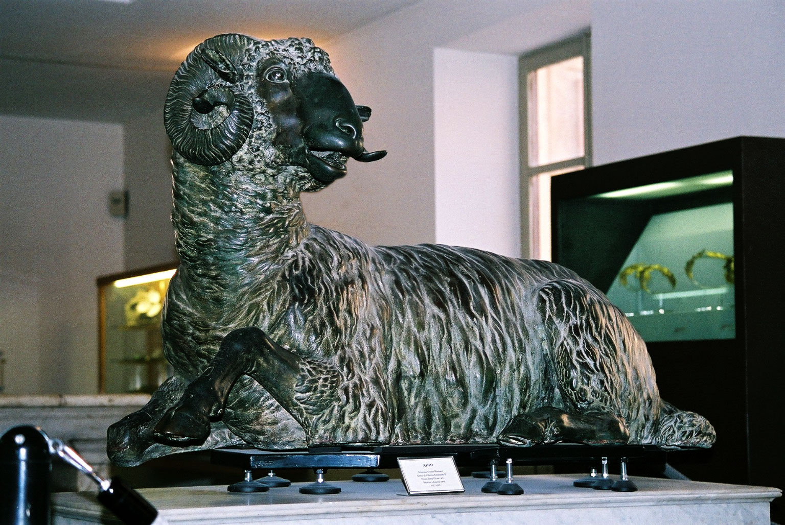 Museo Regionale Archeologico, Palermo Bronze of a ram.